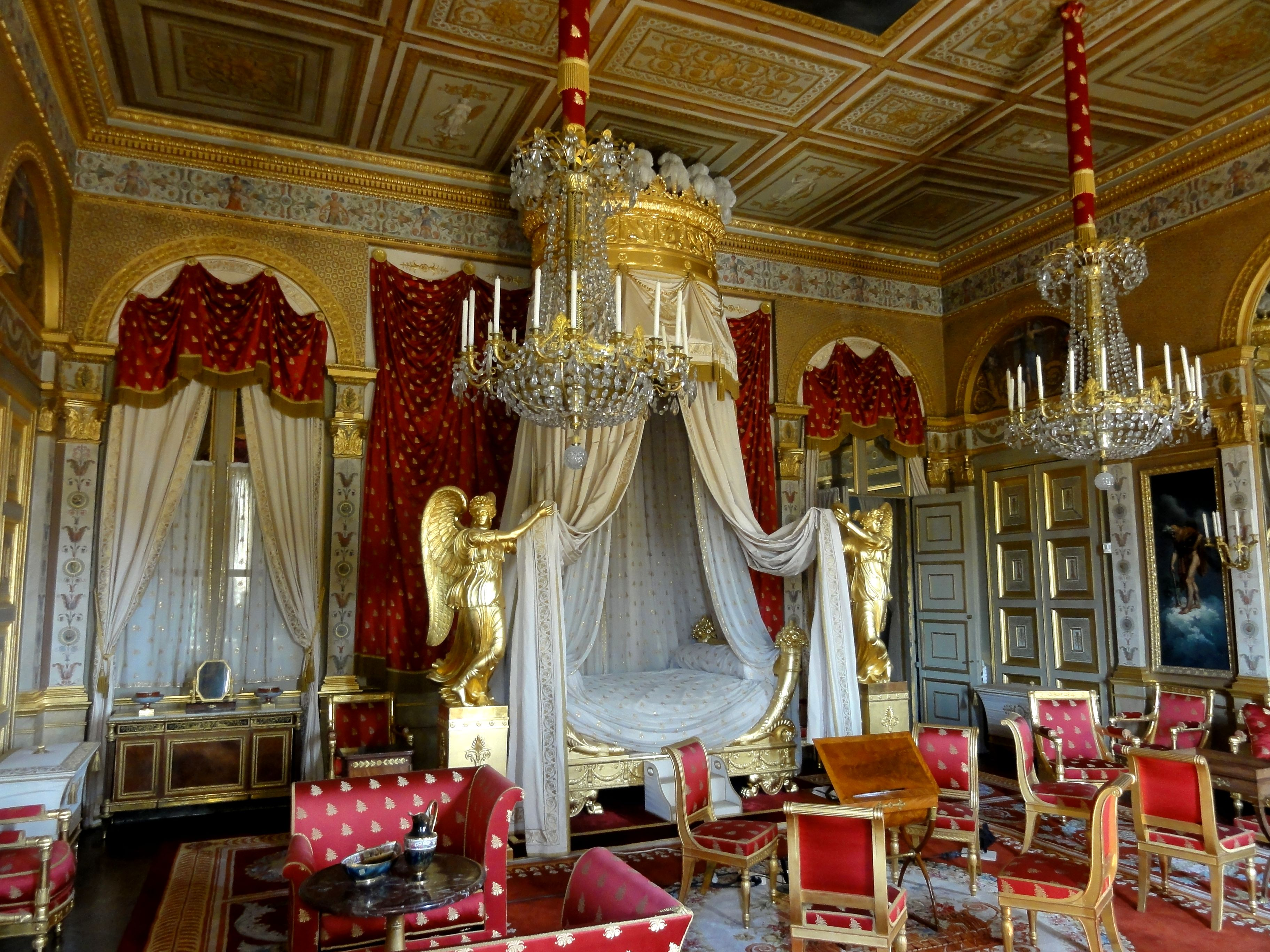 Chambre de l'Impératrice (Premier Empire).